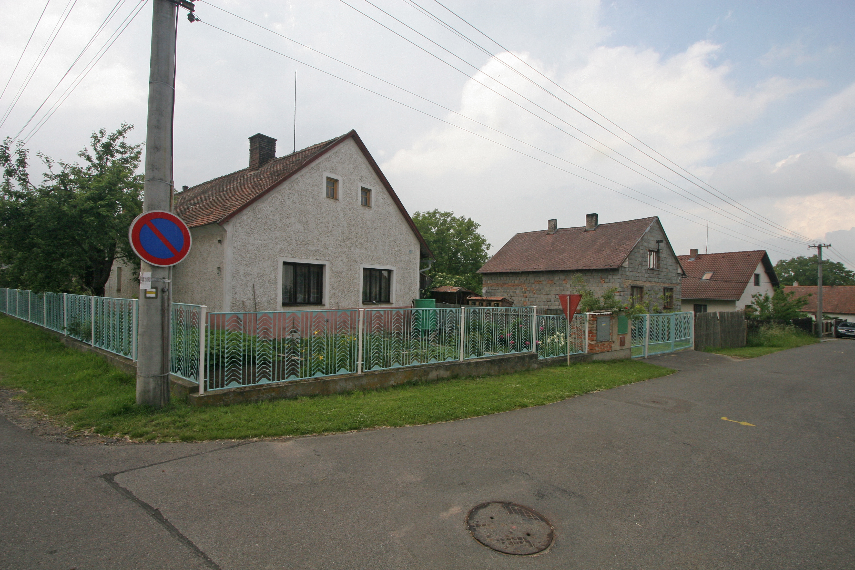 Rabštejnská Lhota čp. 36